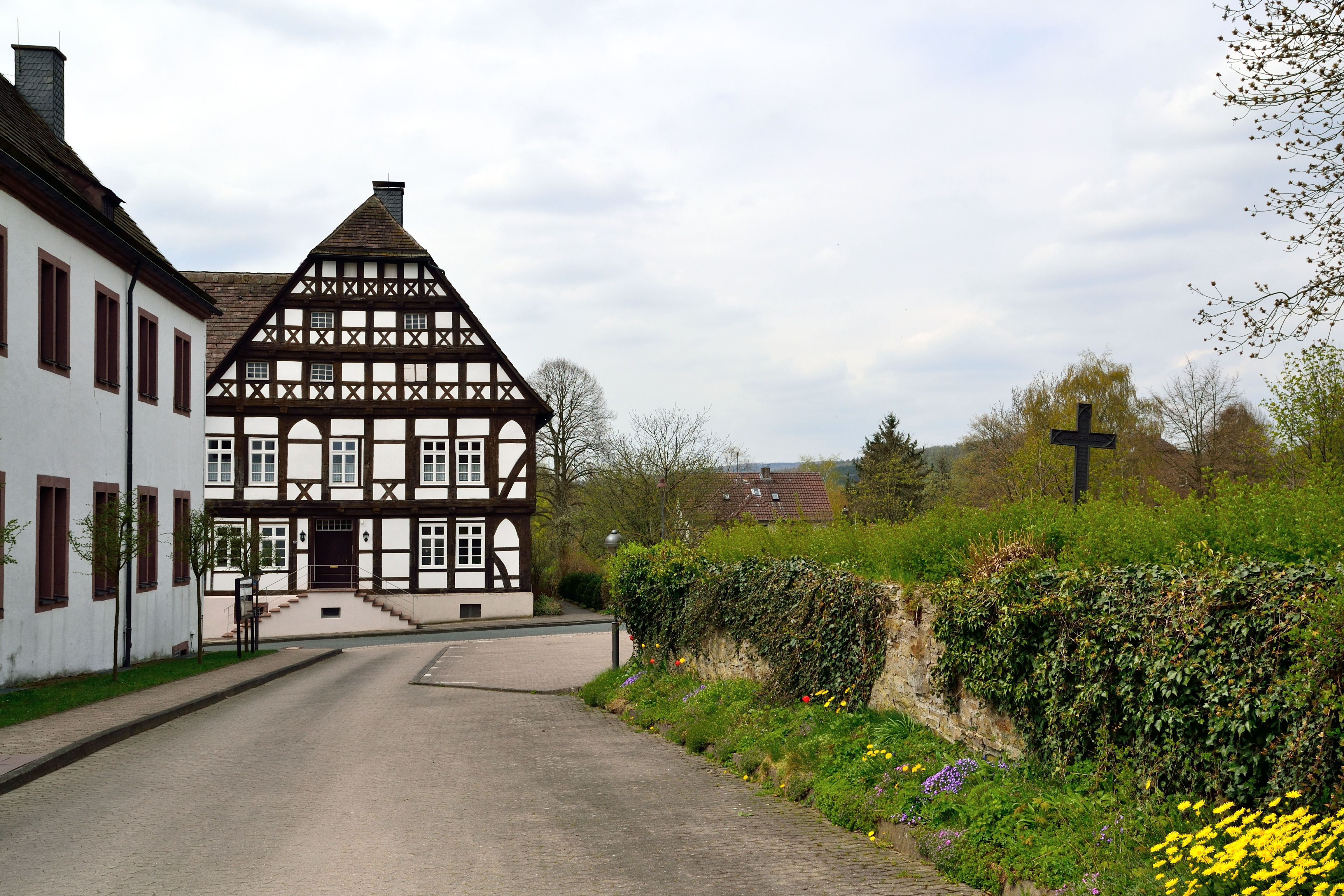 Pfarrhaus der katholischen Kirche St. Michael und Bruchsteinmauer beim Kloster Falkenhagen